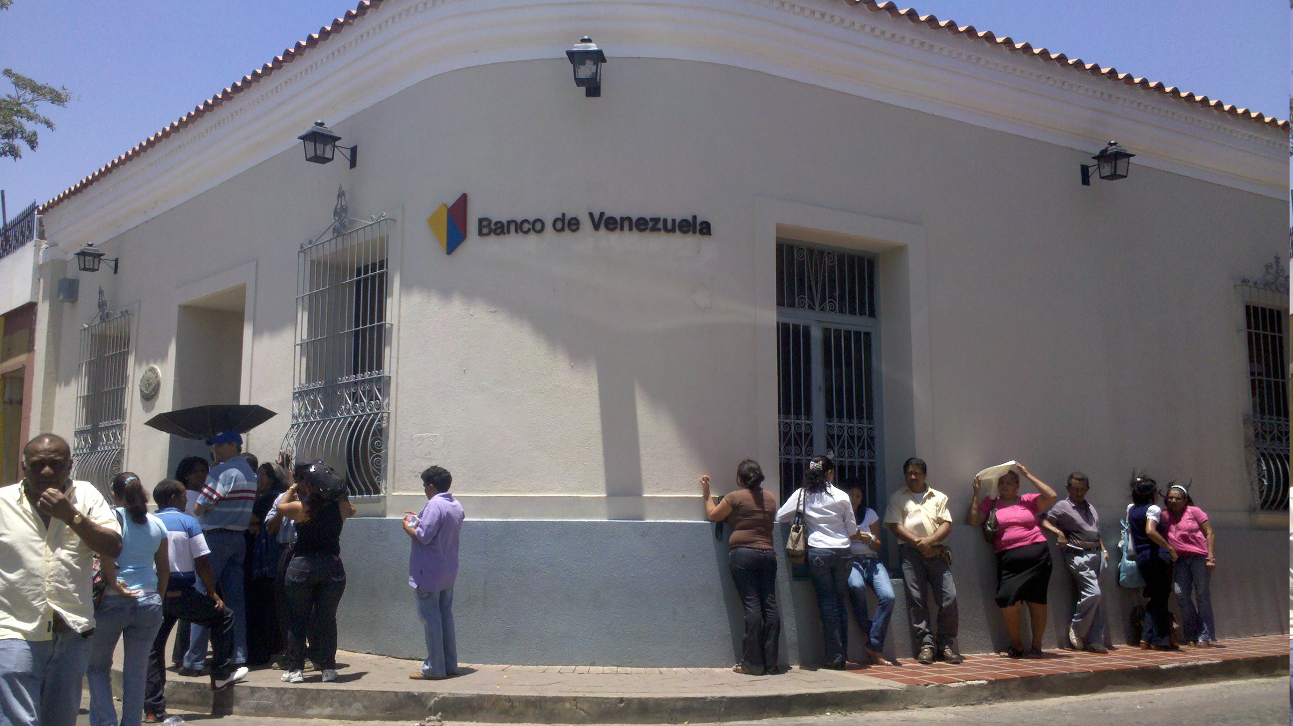 Banco de Venezuela, Santa Ana de Coro.